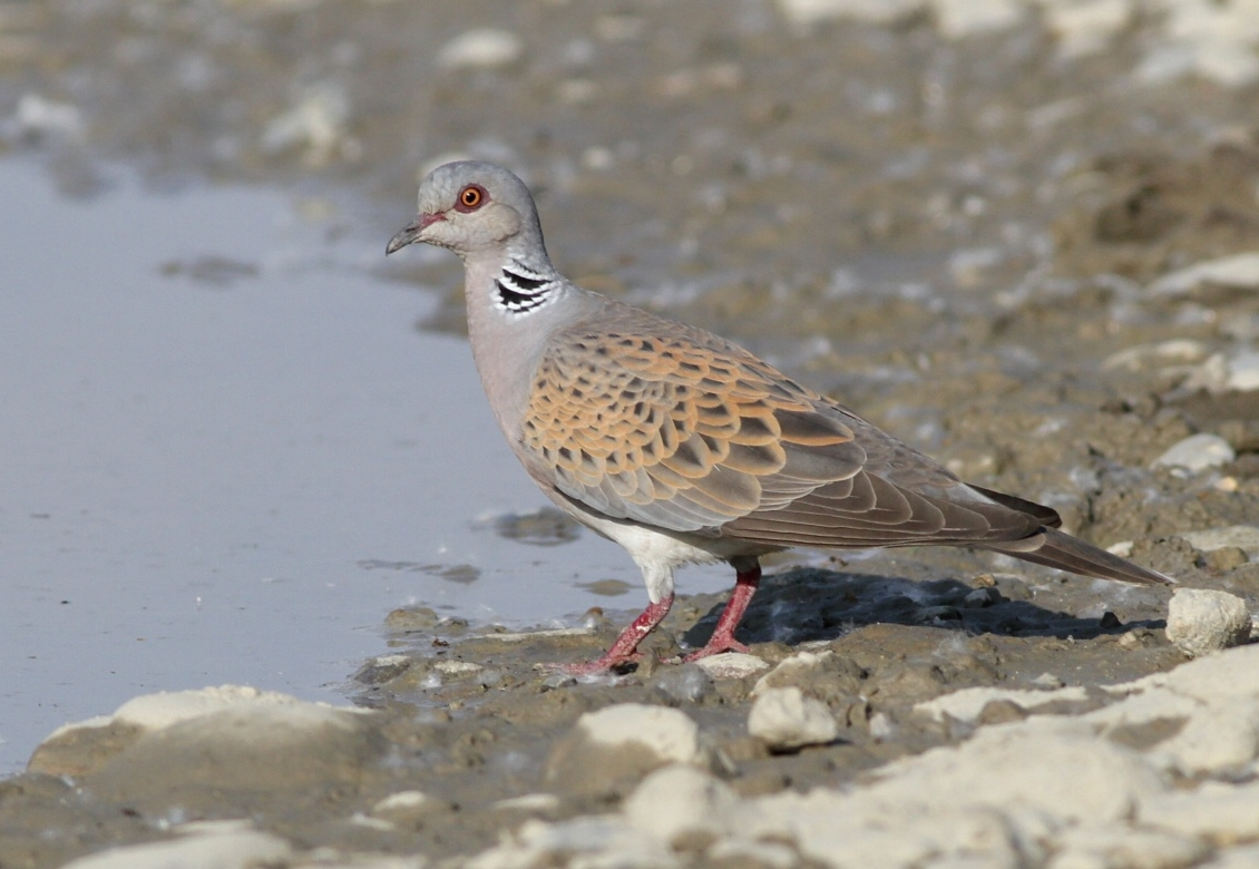 Hrdlička poľná (Streptopelia turtur)_a Újazd, Nemšová